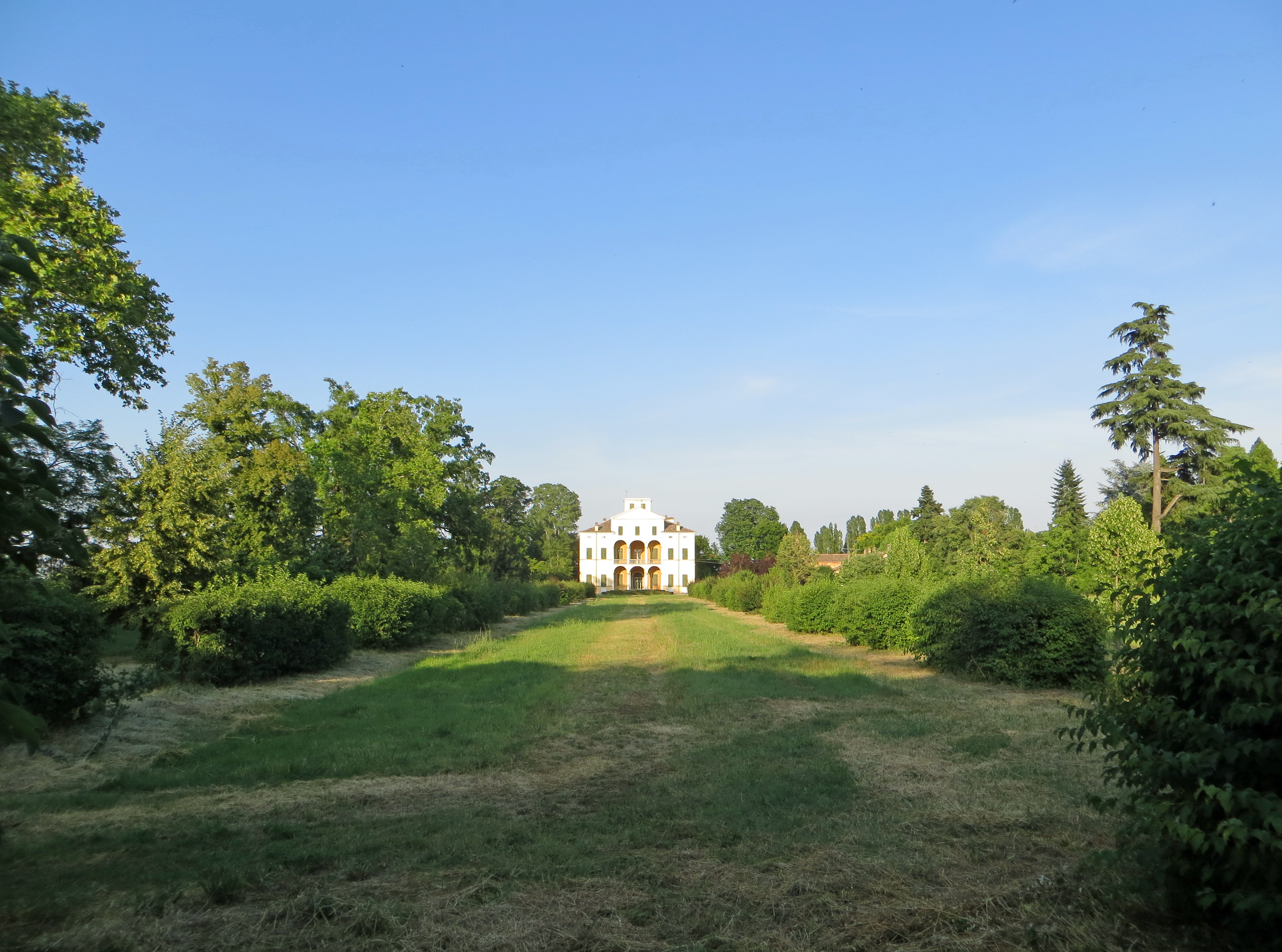 Villa Simonetta (Porporano, Parma) - viale d'ingresso ovest